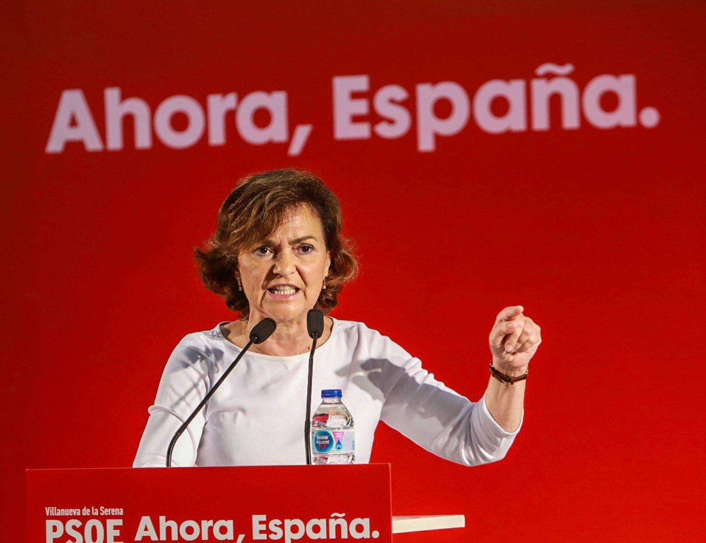 Villanueva de la Serena